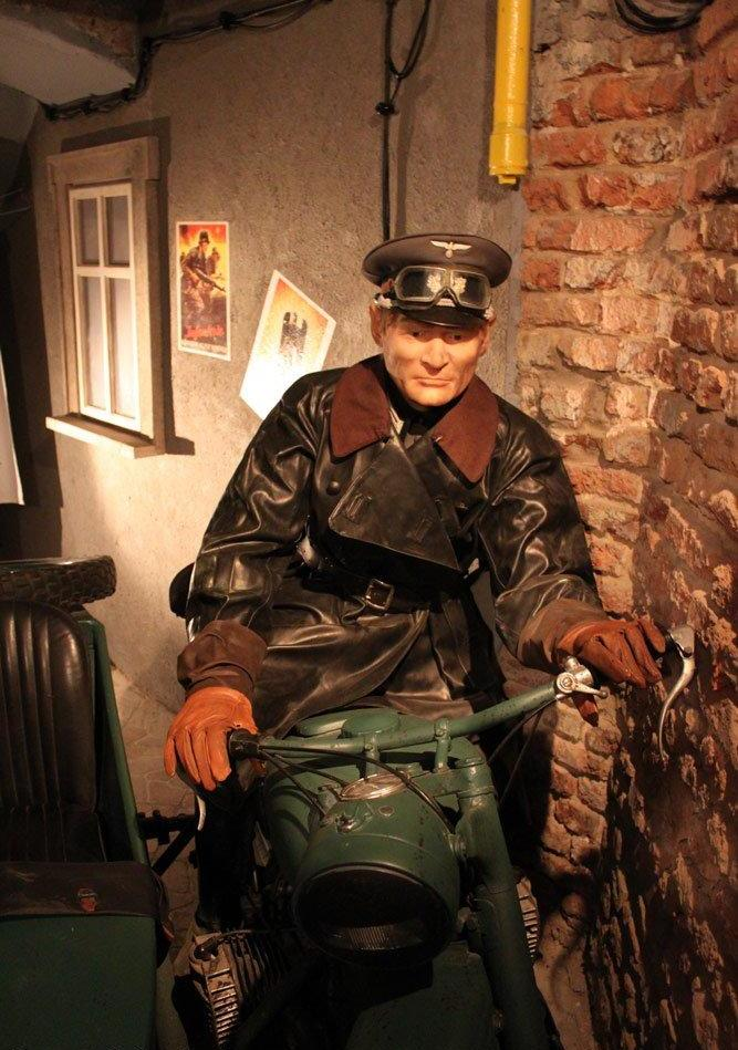 Hans Kloss, nawet podobny.